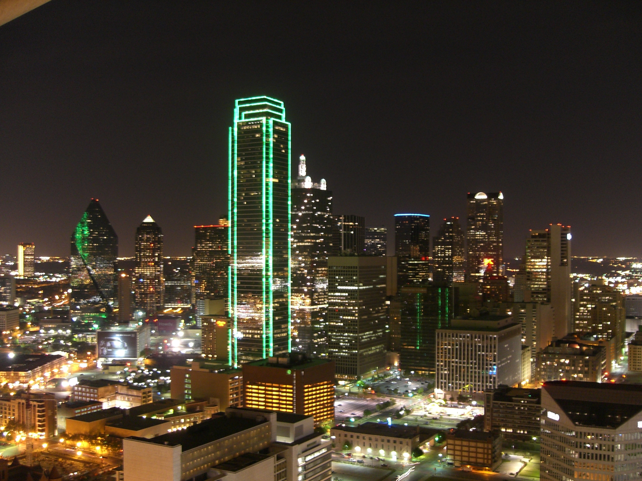 Dallas bei Nacht, fotografiert aus dem "Ball"